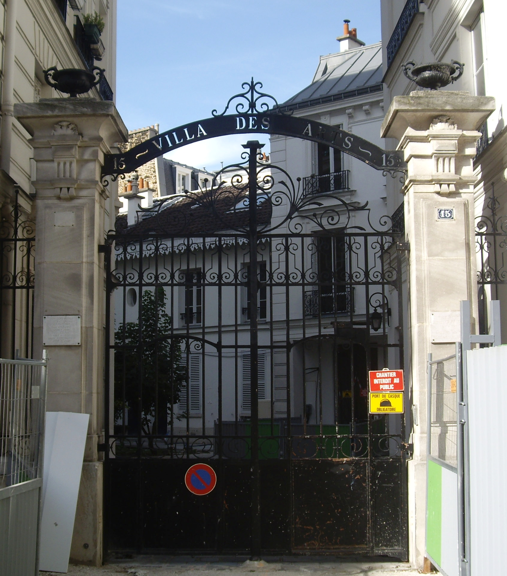 Entrée de la Villa des Arts, 15 rue Hégésippe-Moreau, Paris 18e.